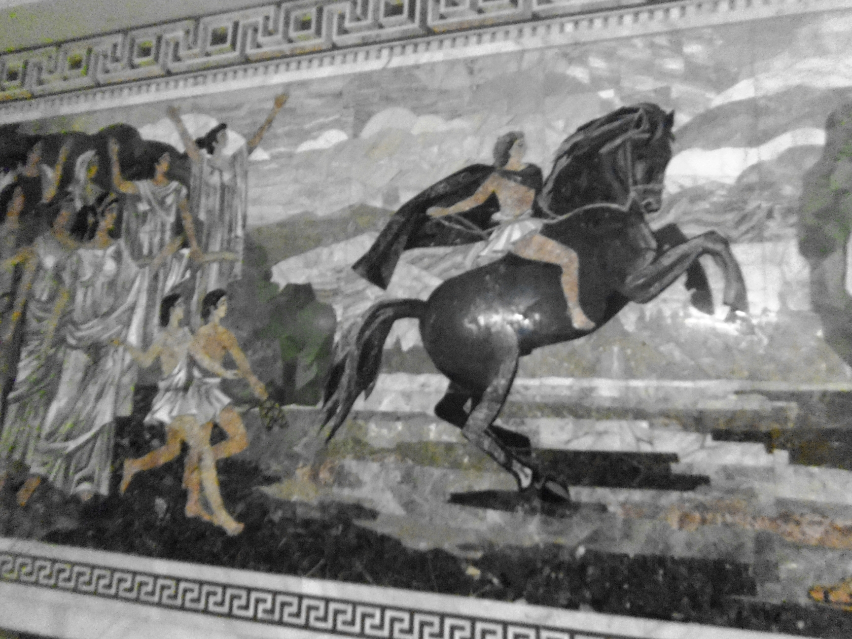 Картины Исторического музея Согдийской области